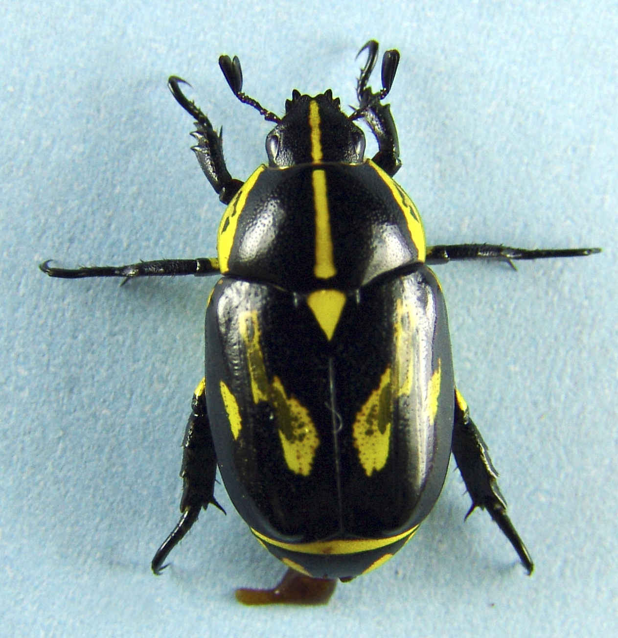 Besouro - coleóptero. Rutela lineola. Avaré, Brazil.